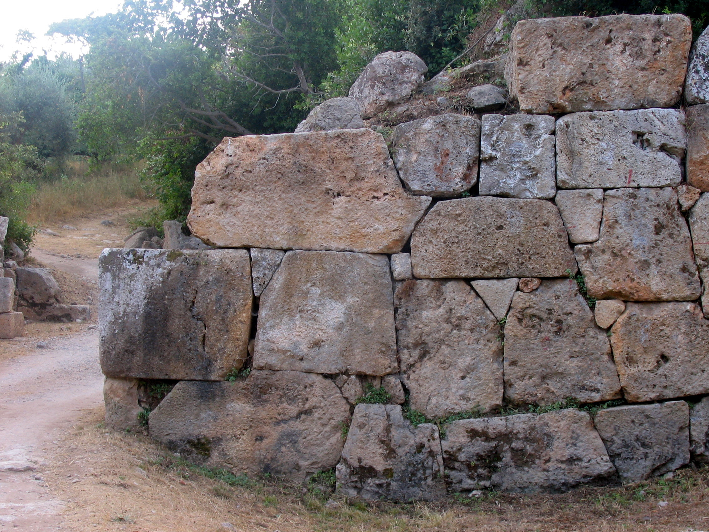 Cosa, Ansedonia, Orbetello, Toscana, Italia